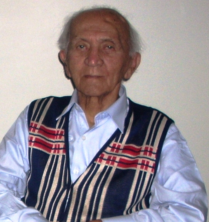 Template: شکیب.